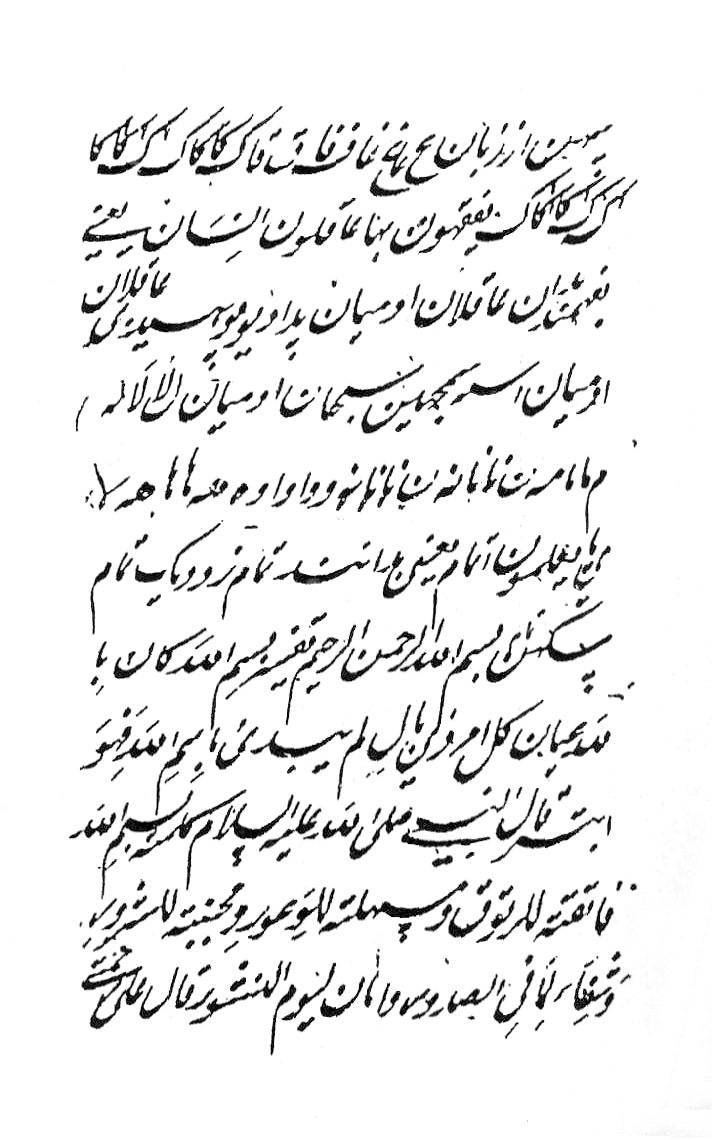 Auszug aus dem Chair al-Bayān von Bāyazid Ansāri